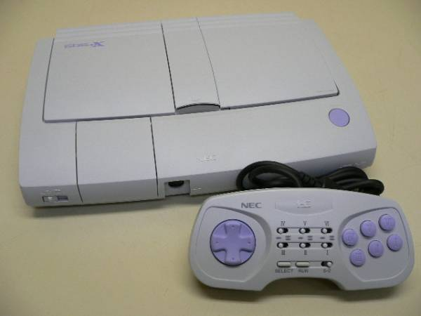 NECホームエレクトロニクス、PCエンジンDuo-RX